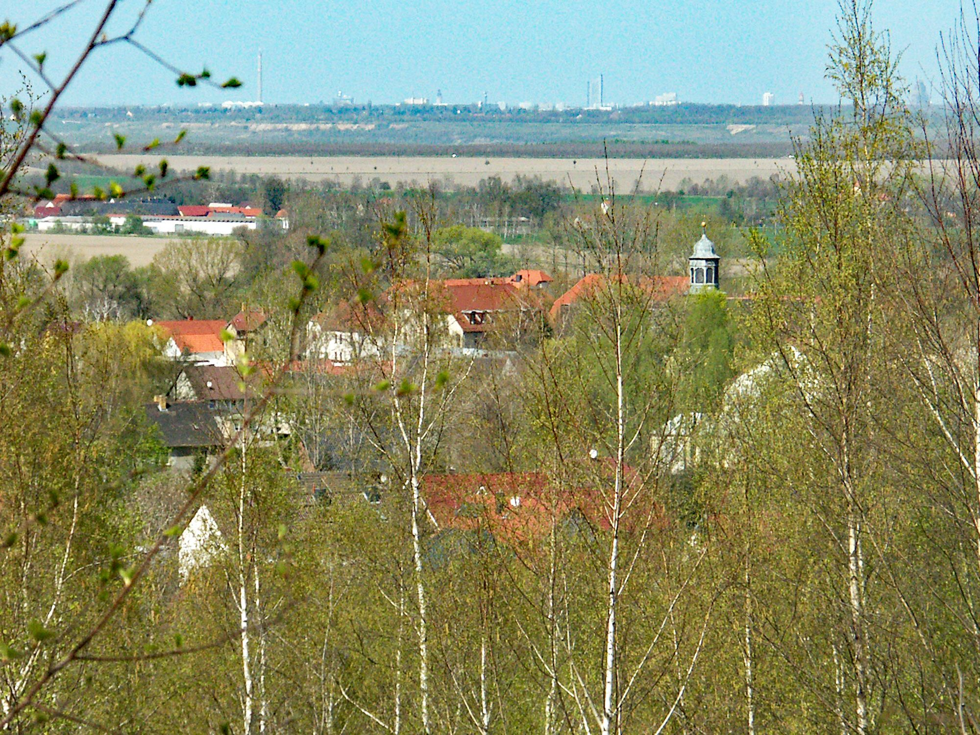 Mölbis von der Halde Trages aus gesehen. Am Horizont die Silhouette von Leipzig